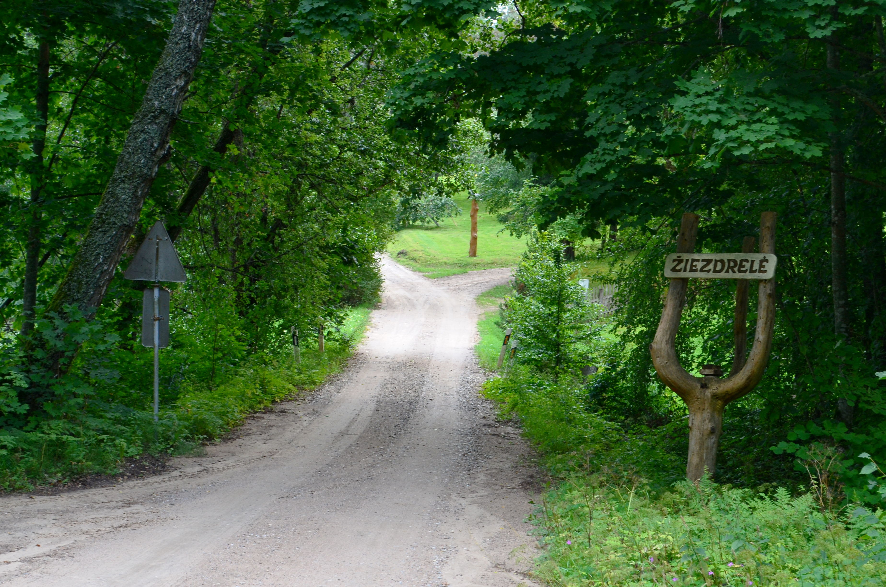 Žiezdrelės k., Utenos raj.